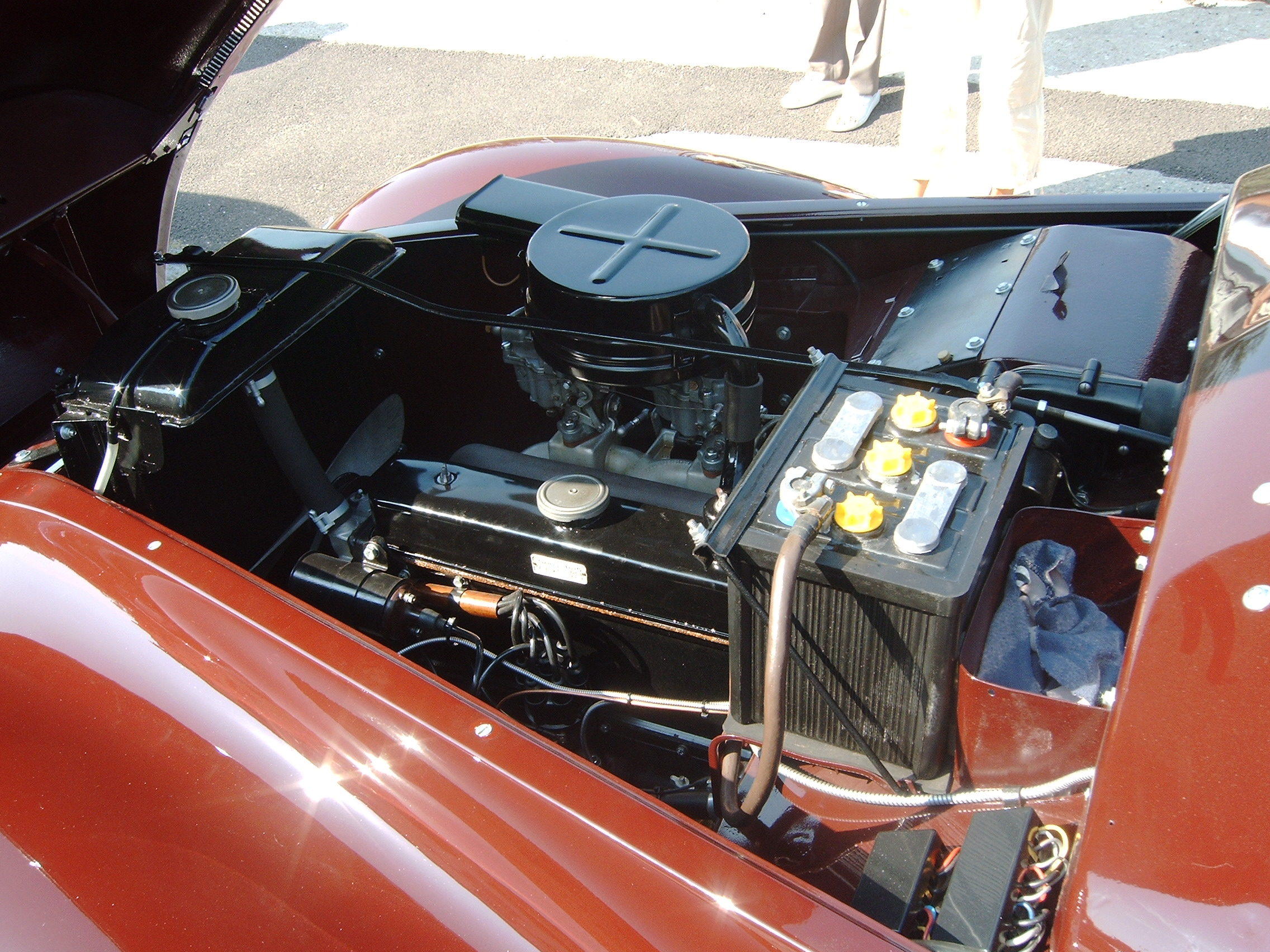 Eisenach, 04.09.2004 EMW 340 Motor